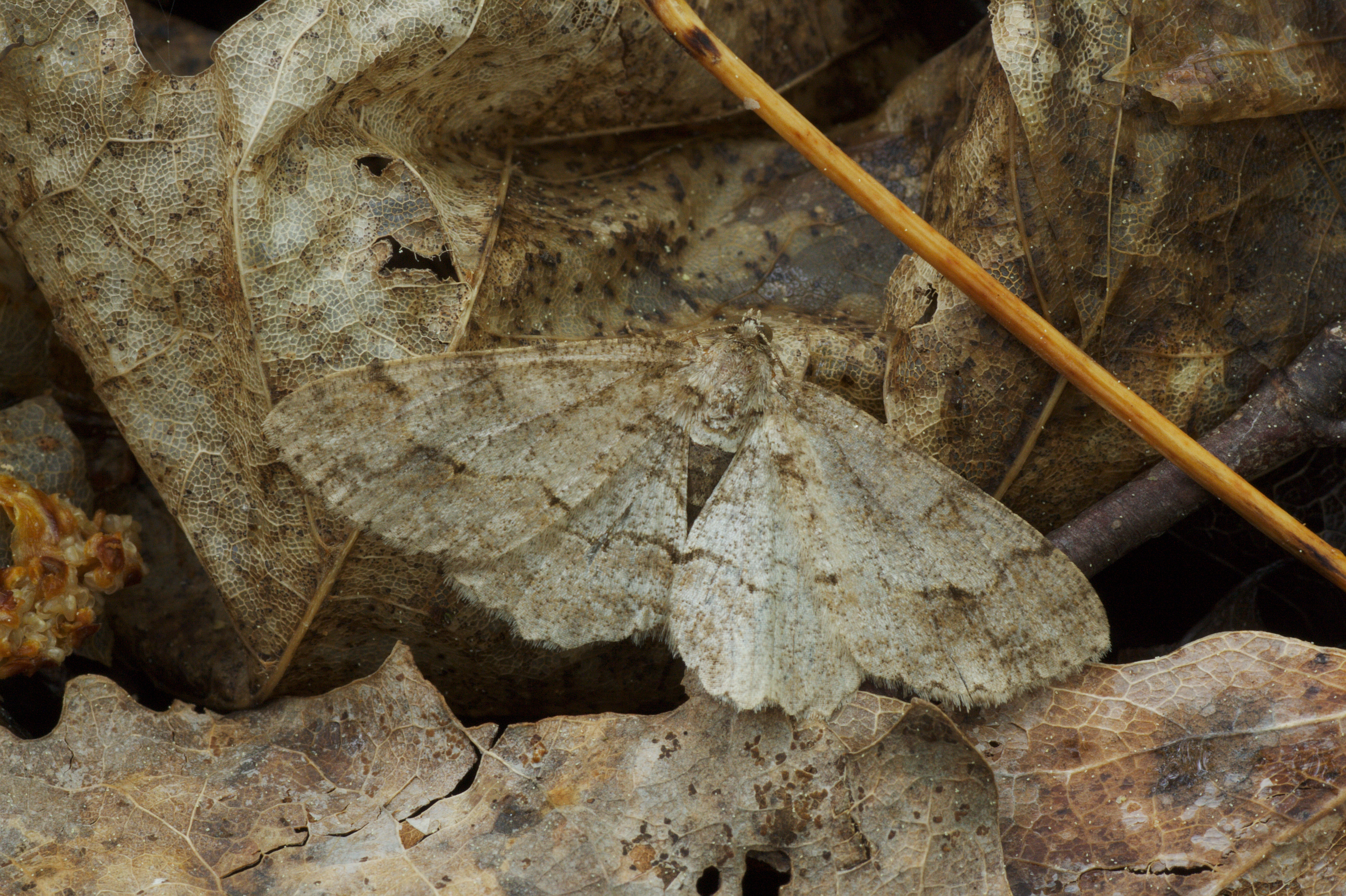 Liblikas varisend lehtedel. See foto sai 2011. aasta Teadusfoto konkursil III koha.